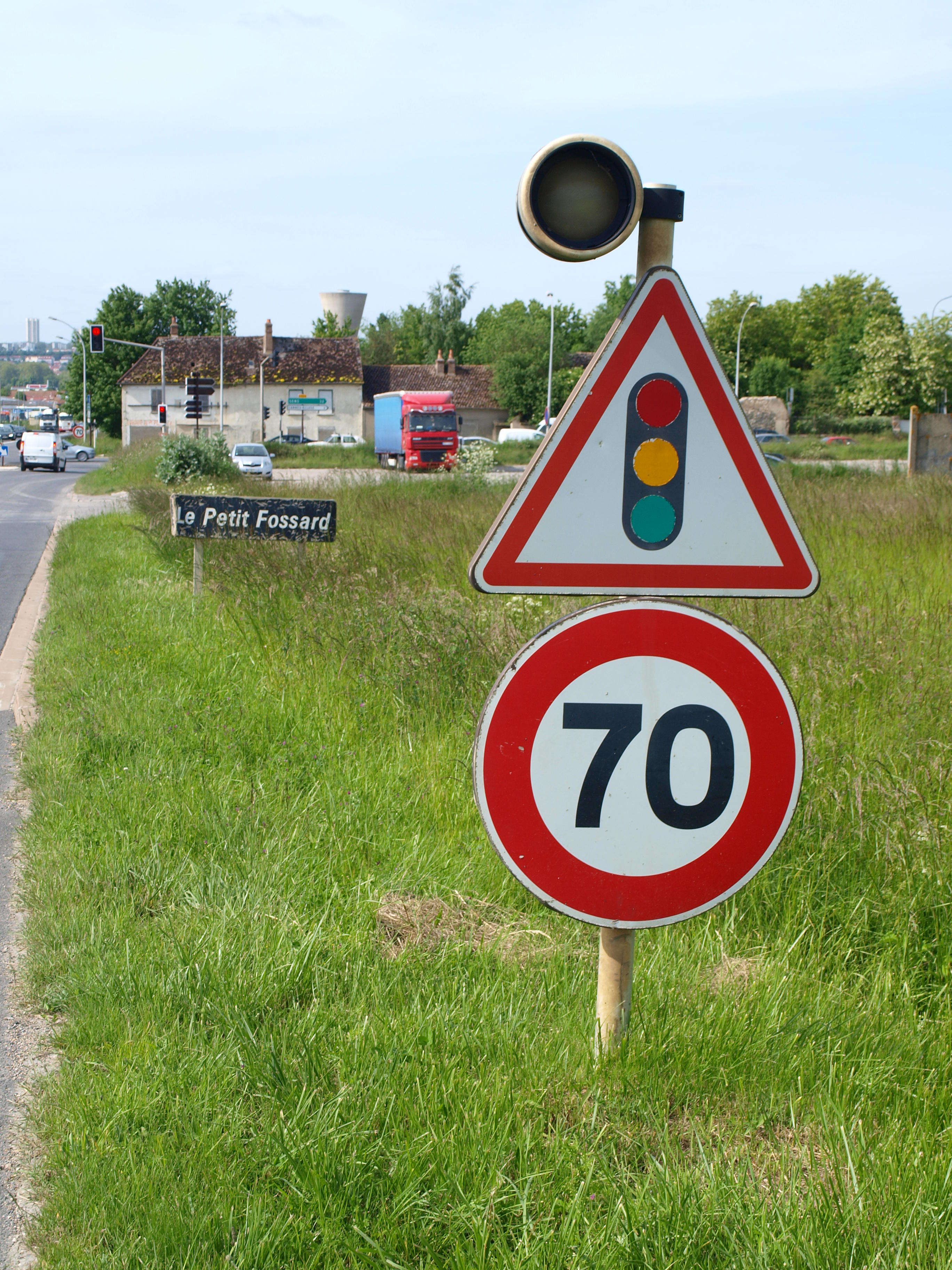 Varennes-sur-Seine (Yonne, France) , hameau du Petit Fossard.